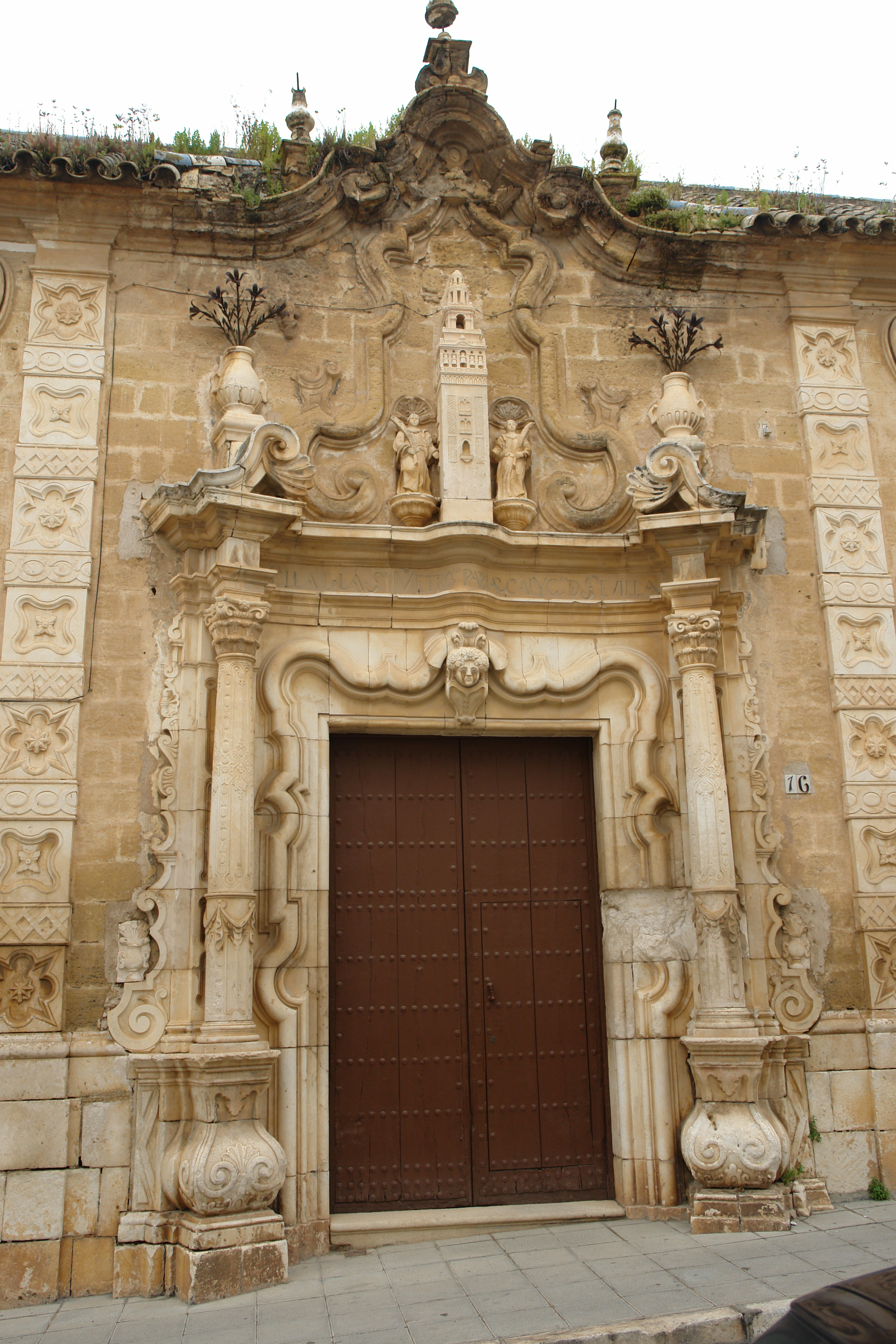 Portada de la Cilla del Cabildo, Osuna